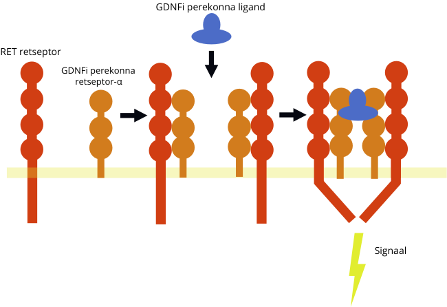 Skemaatiline joonis kuidas GDNF aktiveerib RETi koos kaasretseptor GFRalpha-ga.